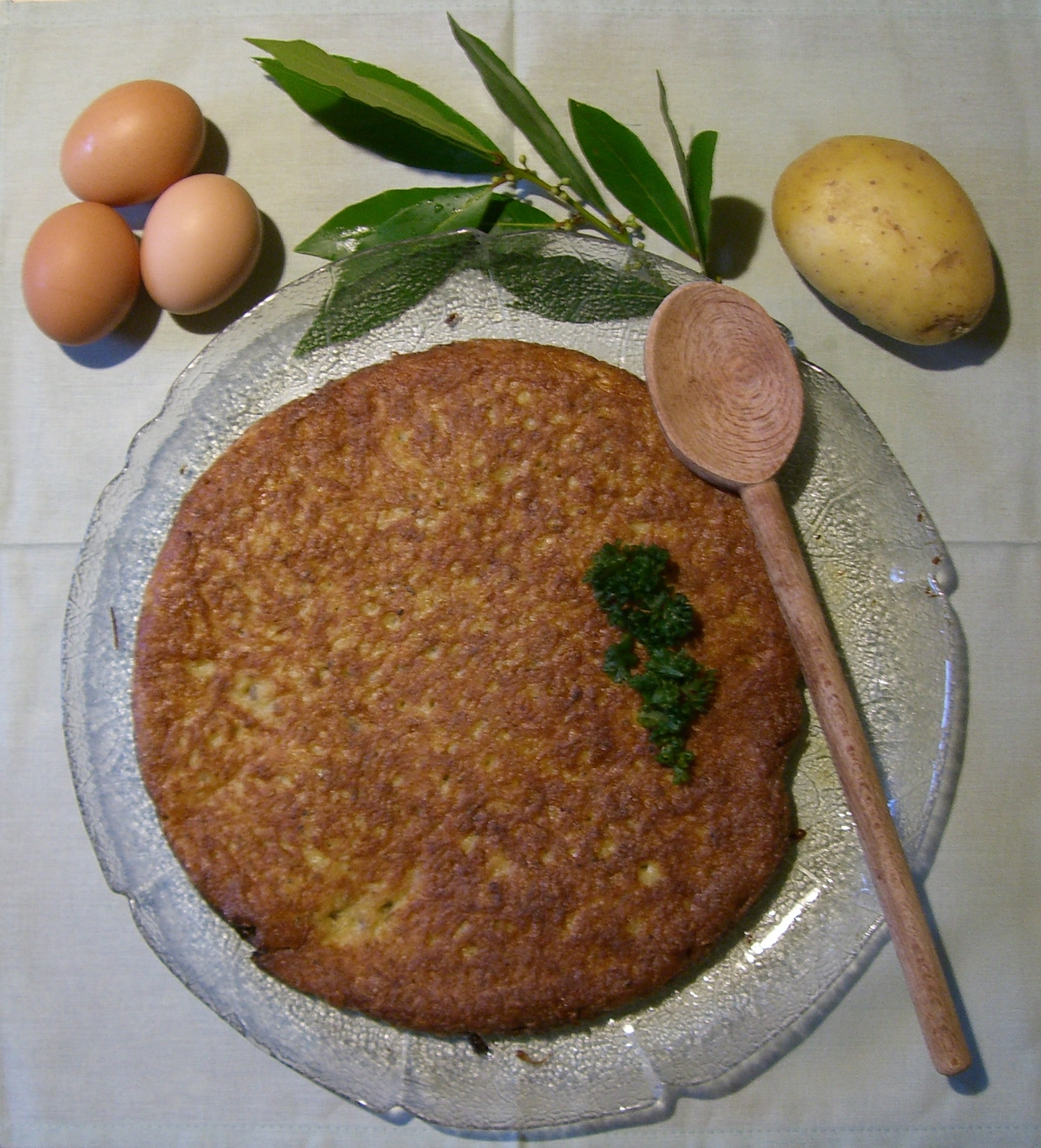 La crique ardéchoise faite maison. Merci à ma maman ^^.